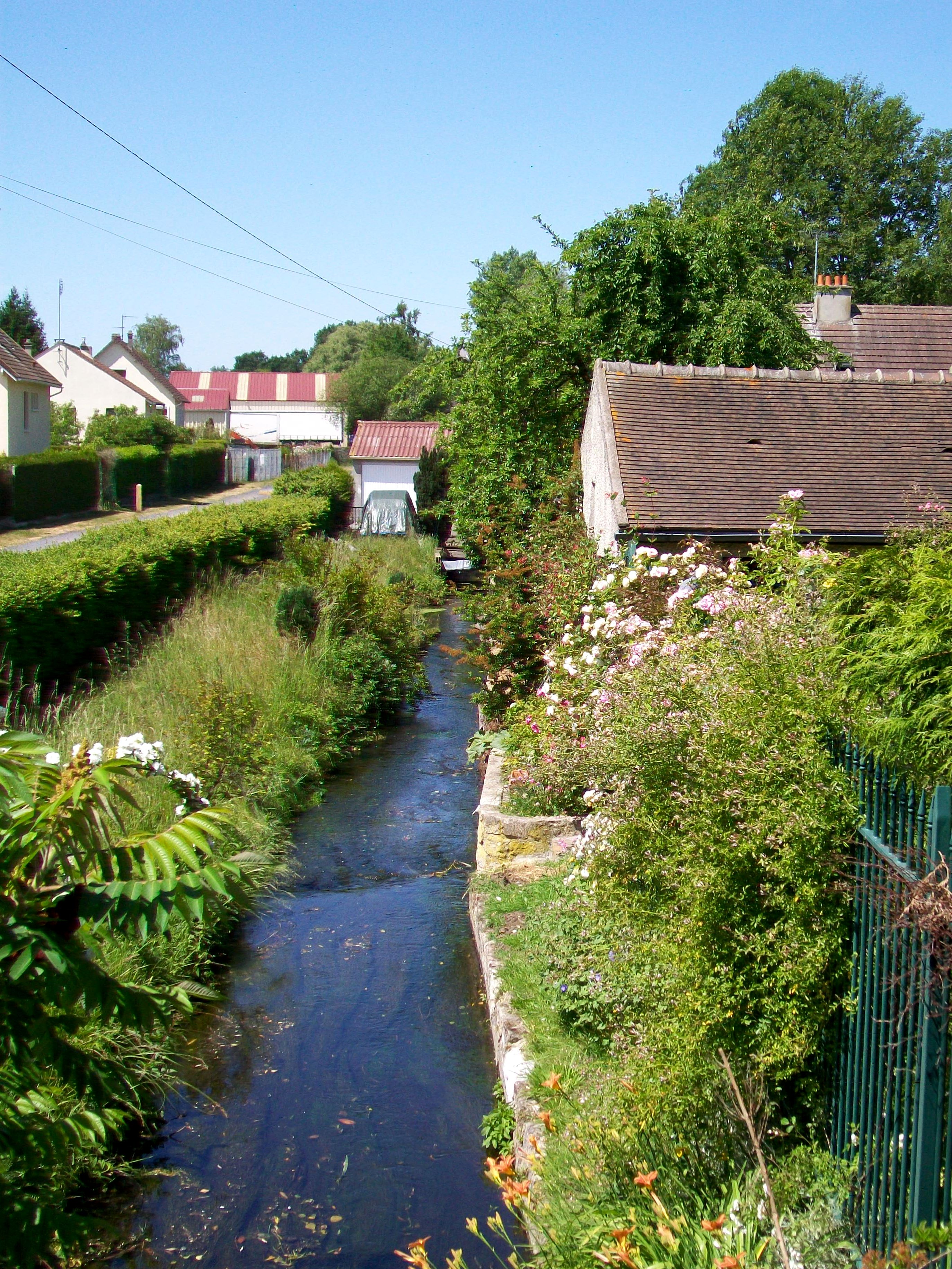 La Vieille Thève à Lamorlaye (Oise) ; son envergure est environ la moitié de celle de la Nouvelle Thève en lisière du Bois de Bonnet. De ce fait, le lavoir du village était établi sur la Nouvelle Thève (chemin du vieux Lavoir), bien que plus éloignée.